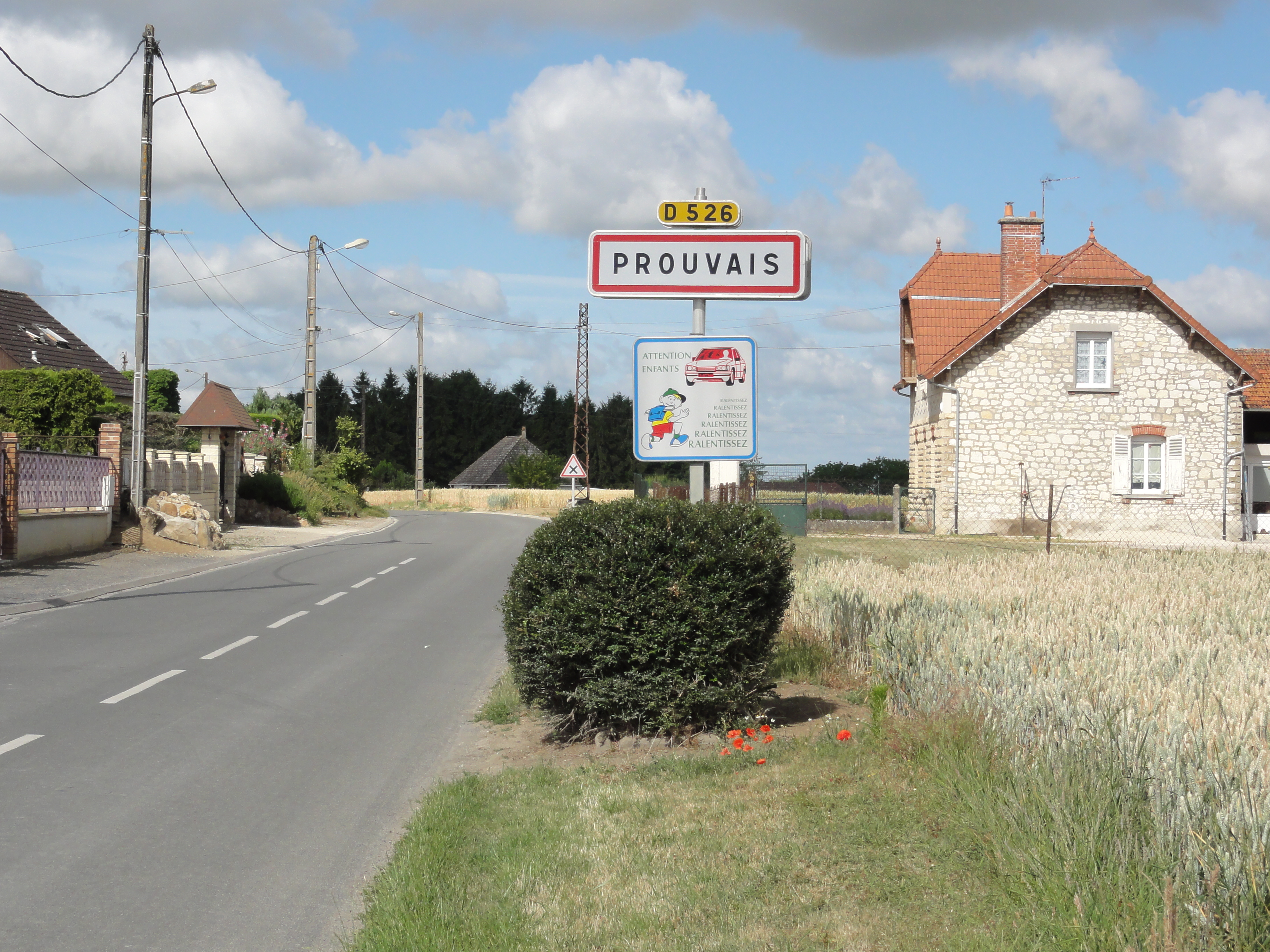 Prouvais (Aisne) city limit sign